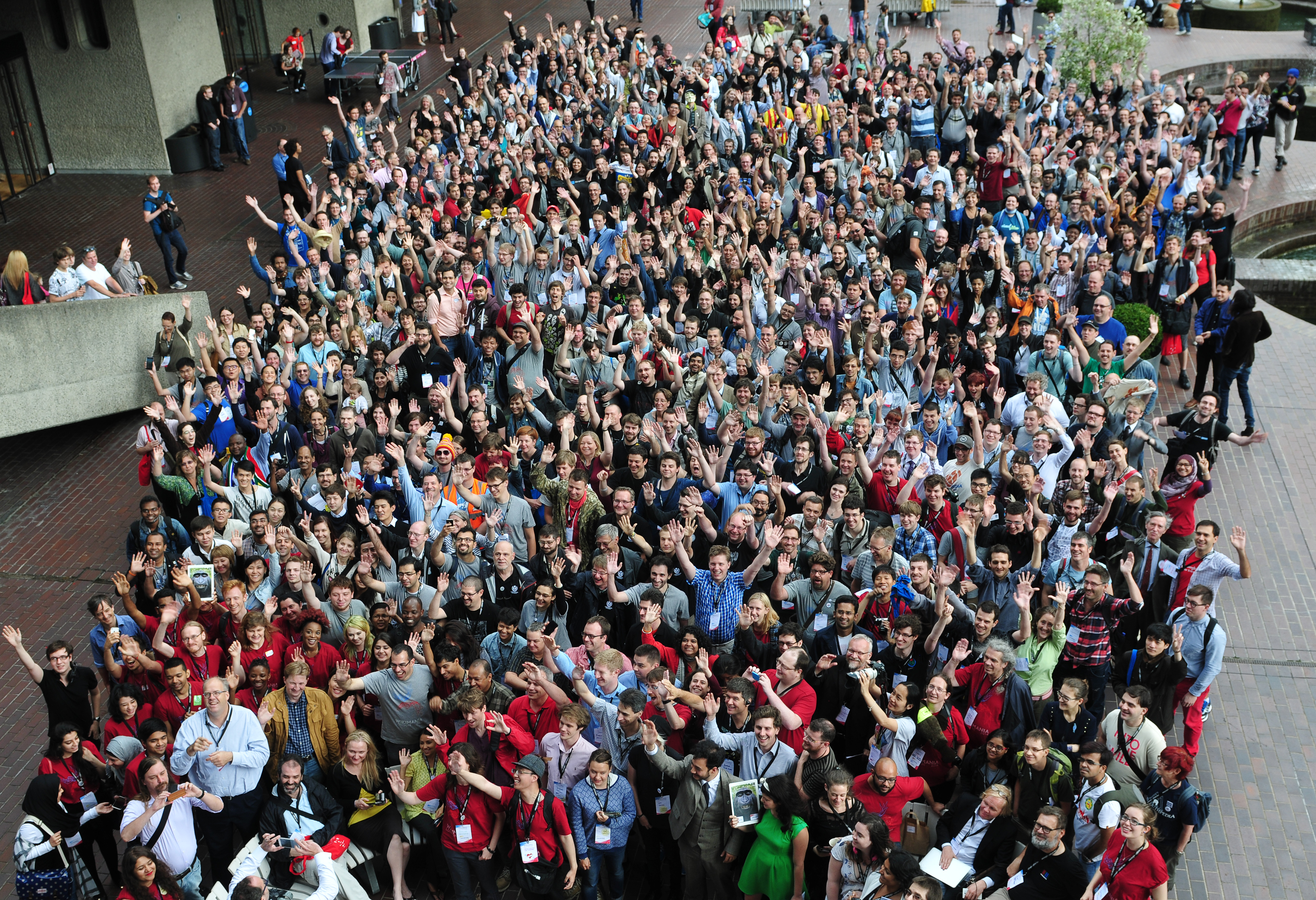 Gruppenfoto Wikimania 2014 London